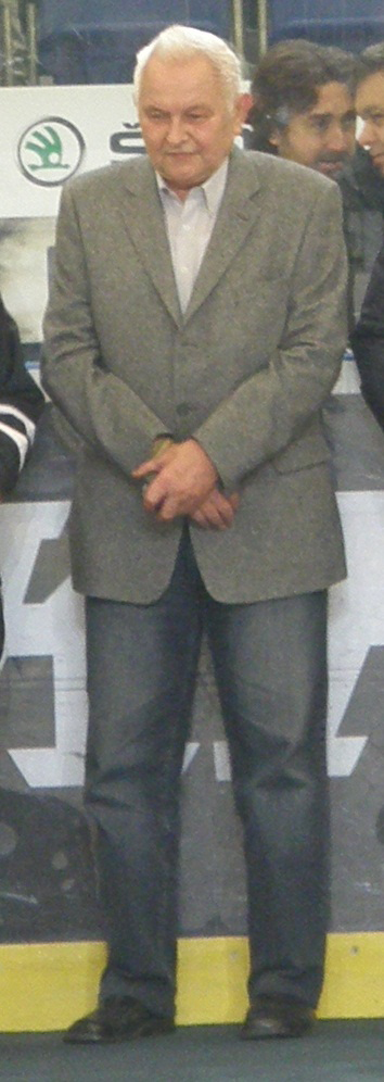 Rudolf Potsch, bývalý hokejista (* 1937), při křtu knihy Kometa - příběh hokejového klubu v Kajot aréně